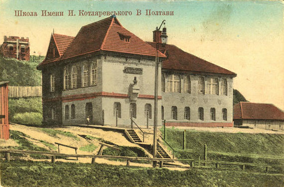 Школа ім. І. П. Котляревського. Збудована у 1903—1905 рр. у формах українського архітектурного стилю.